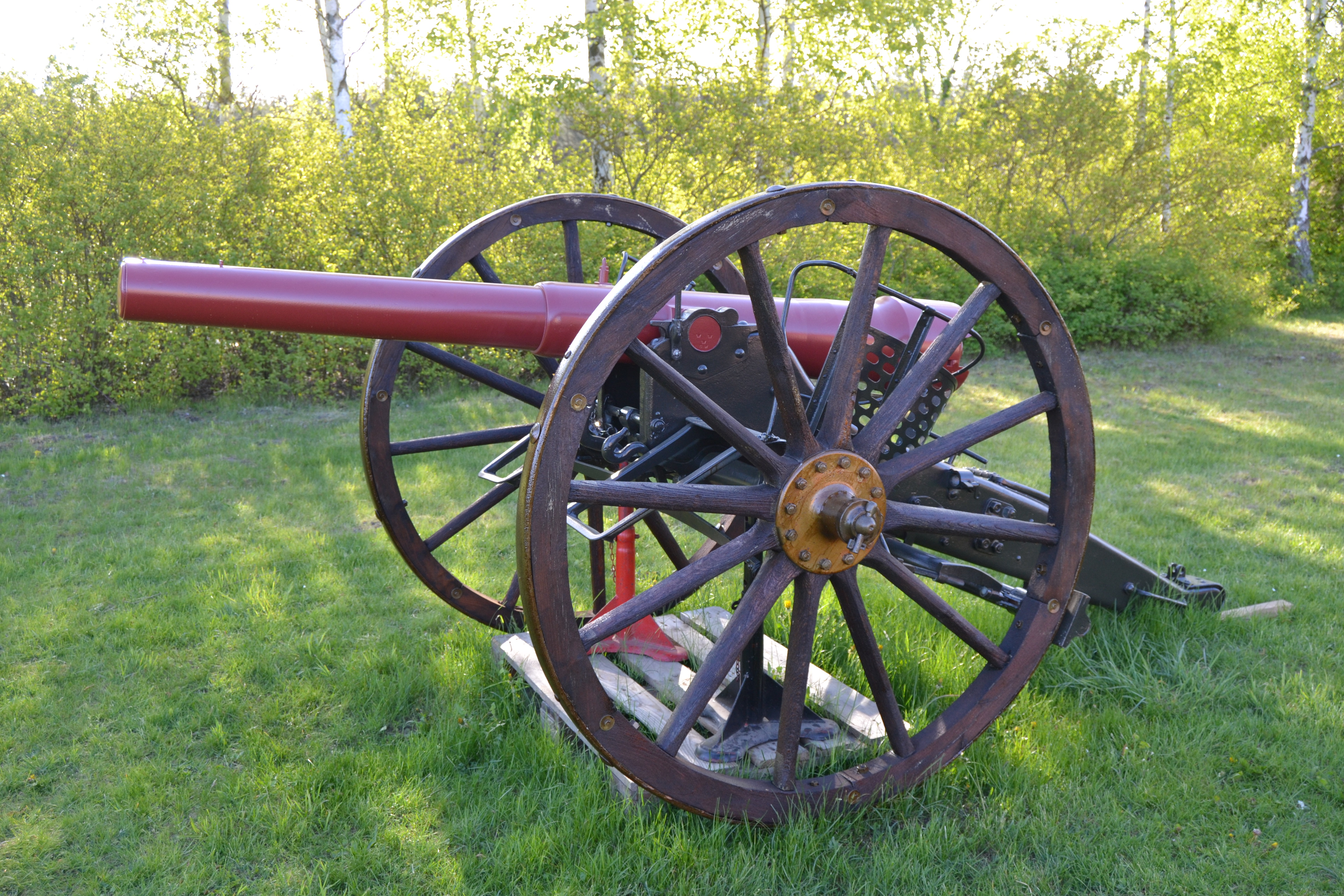 8,4 cm kanon modell 1894